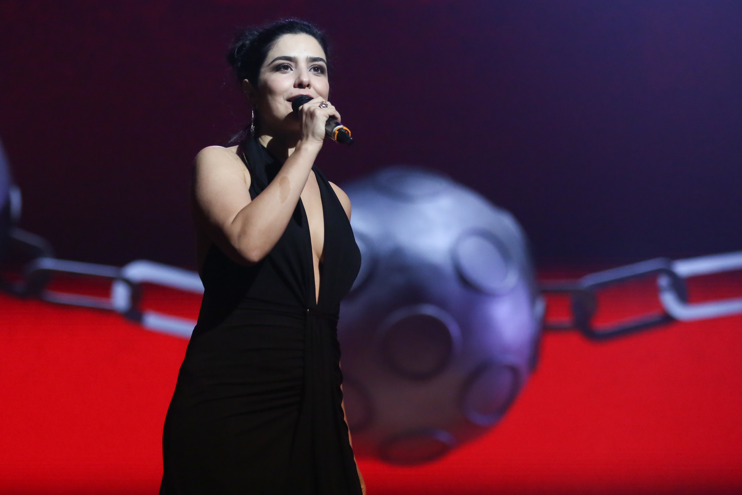 Letícia Sabatella - 26° Prêmio da Música Brasileira 2015, no Theatro Municipal, no Centro do Rio de Janeiro/RJ. (10/06/15) Foto: Roberto Filho/Divulgacão